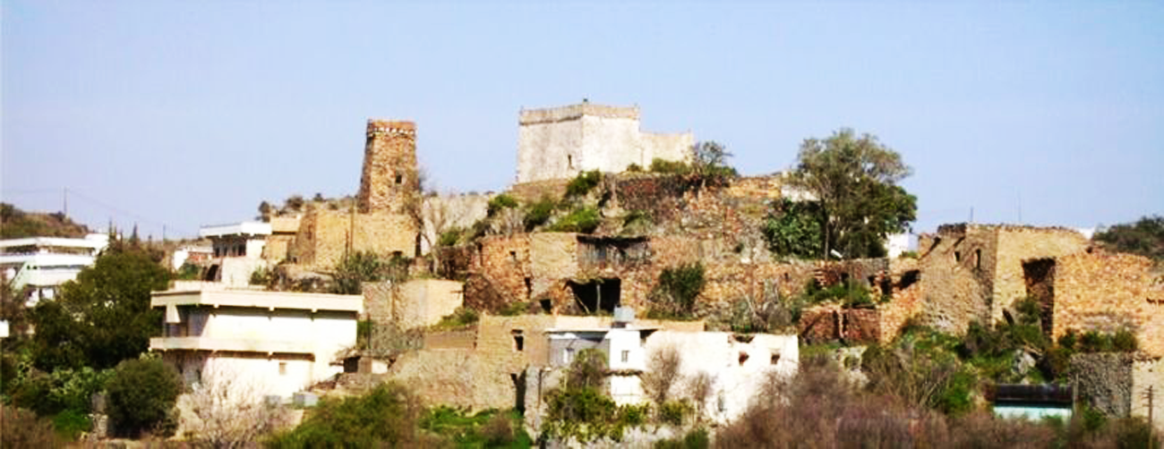 بلاد قبيلة حوالة